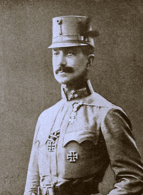 General Eduard von Böhm Ermolli während des ersten Weltkriegs